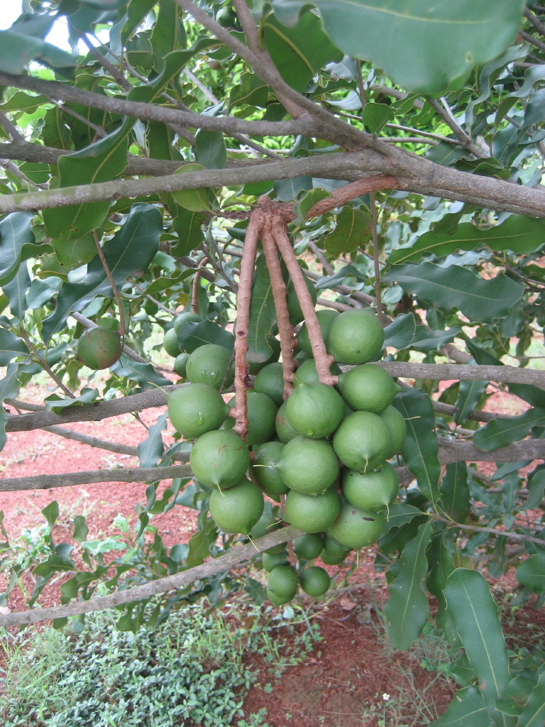 Un-ripe Macadamia, Swaziland.